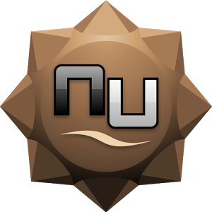 Logo ke hře Numerus